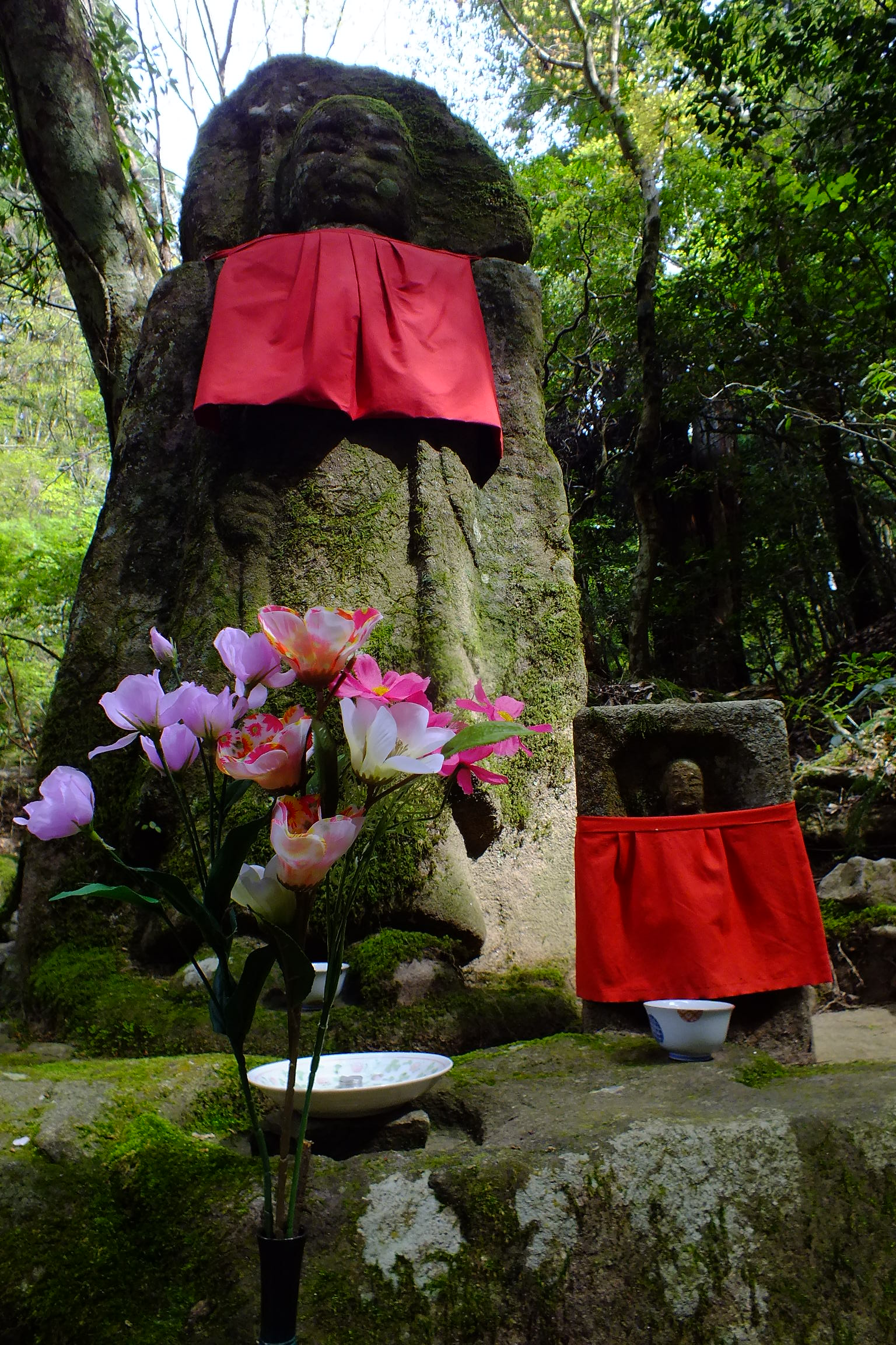 2017-04-22 Kubikiri Jizo in Yagyu Kaido